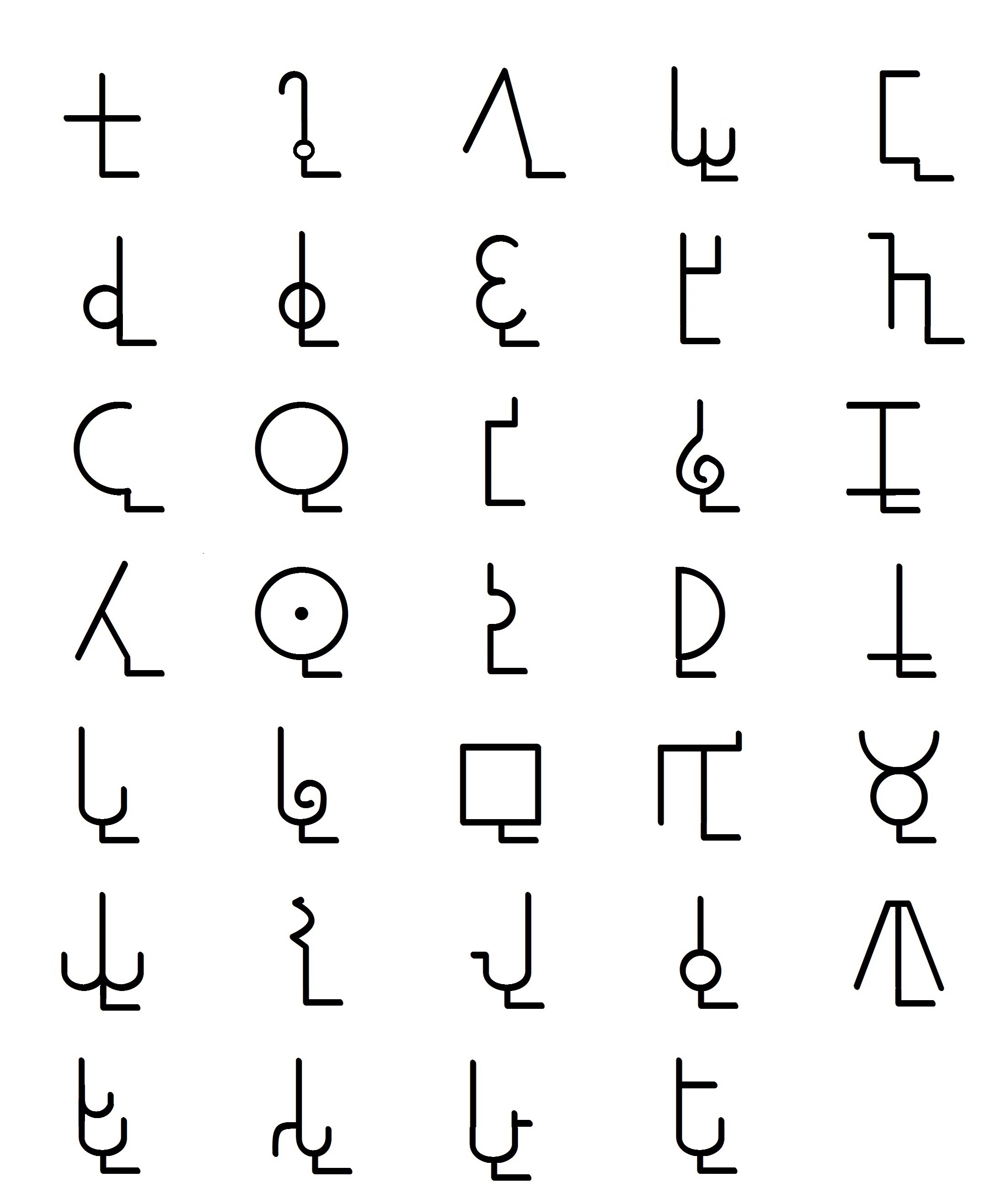 ब्राम्हि व्यंजनांचे उ-कार (ऱ्हस्व)